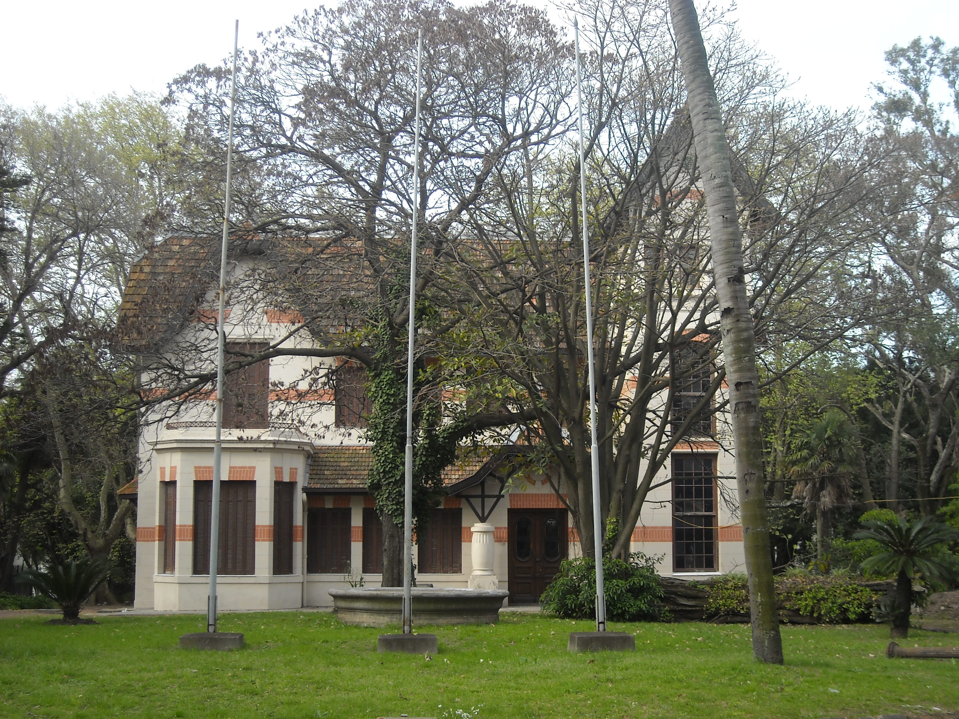 Casa del Dr. Luis Alberto de Herrera. Ubicada en el departamento de Montevideo